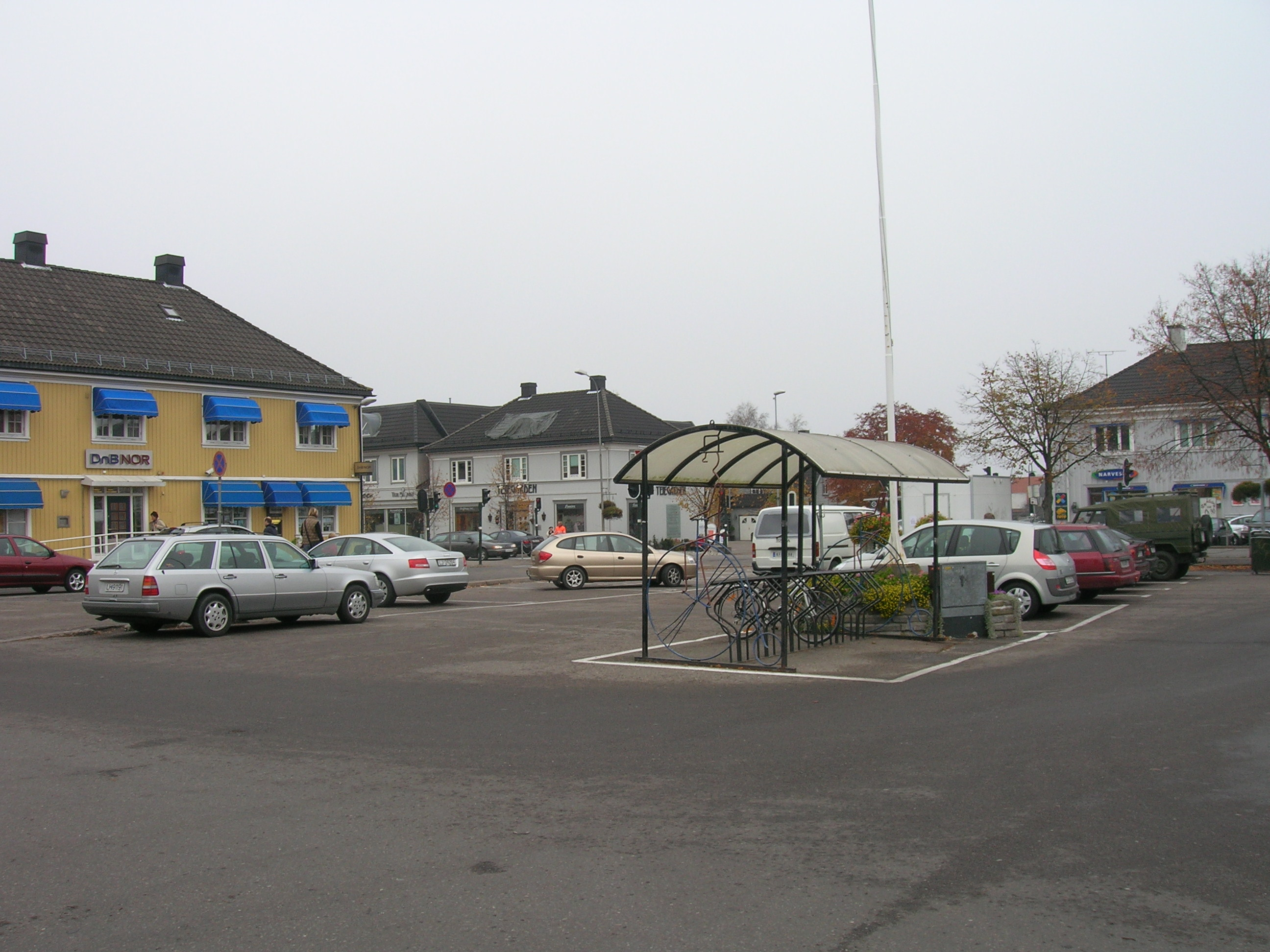 Teie torv, Nøtterøy